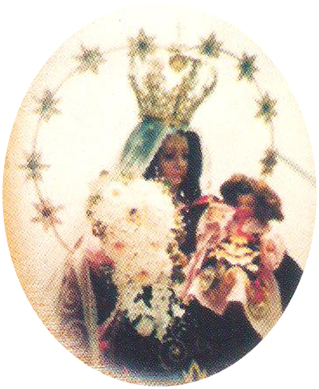 Vsita de la Patrona Virgen del Rosario de Ocros